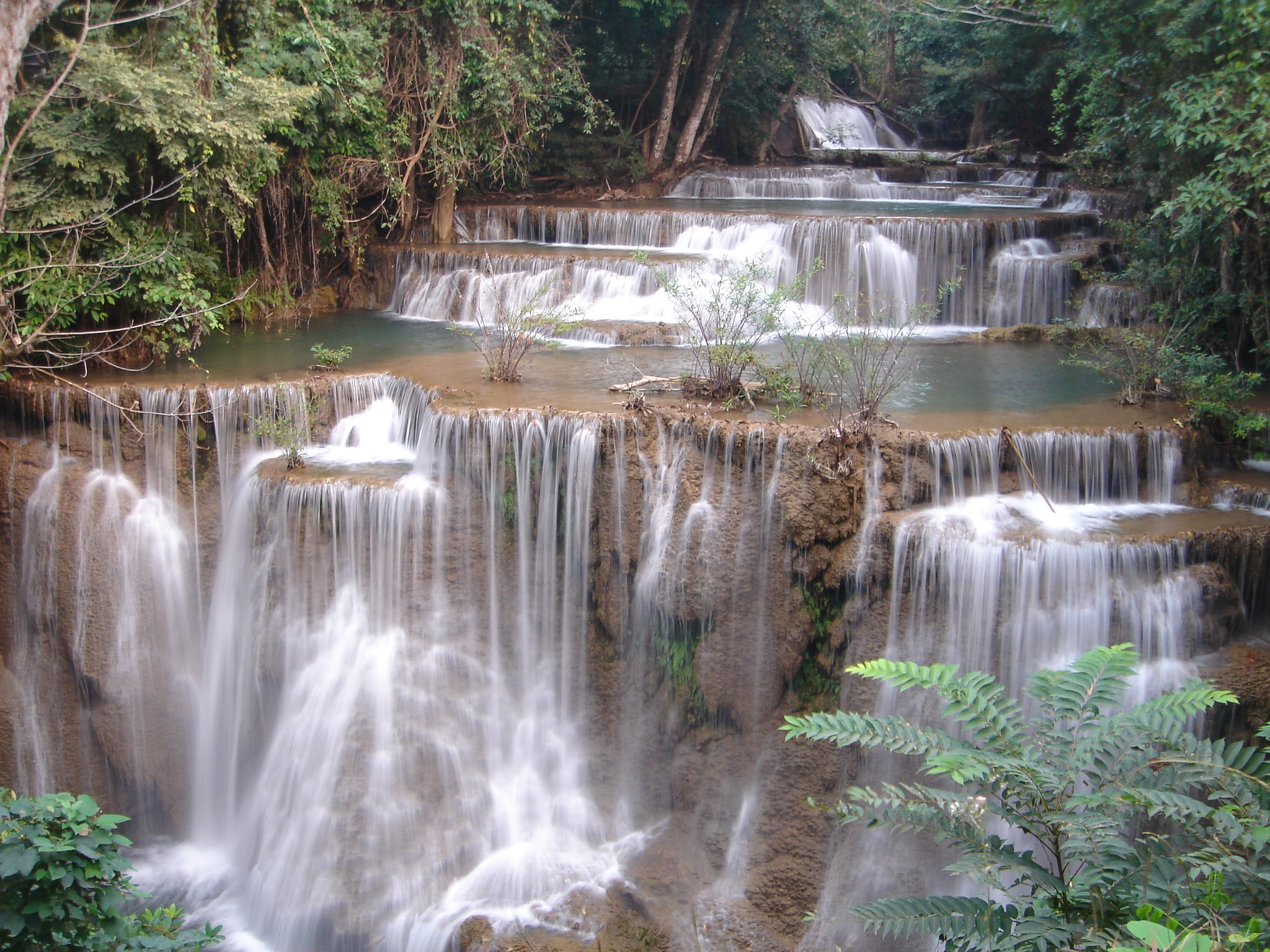 น้ำตกห้วยแม่ขมิ้น ชั้นที 4 ฉัตรแก้วKhuean Sri Nakarin National Park